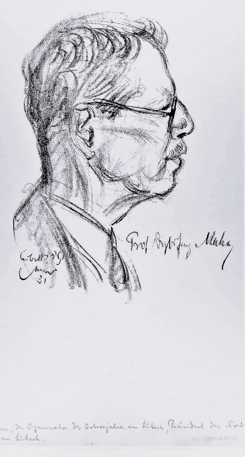 Professor Dipl.-Ing. Heinrich (Heinz) Mahn (1872-1945) in Lübeck. Schriftleiter der Lübeckischen Blätter bis 1922. Präsident der Nordischen Gesellschaft in Lübeck. Organisator des Ostseejahres 1931. Zeichnung von Emil Stumpp 1931.